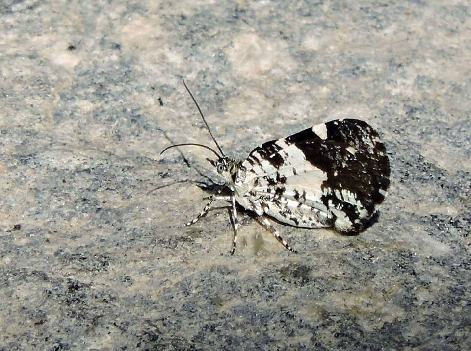 Heterusia conflictata,Cunha SP _ Brasil